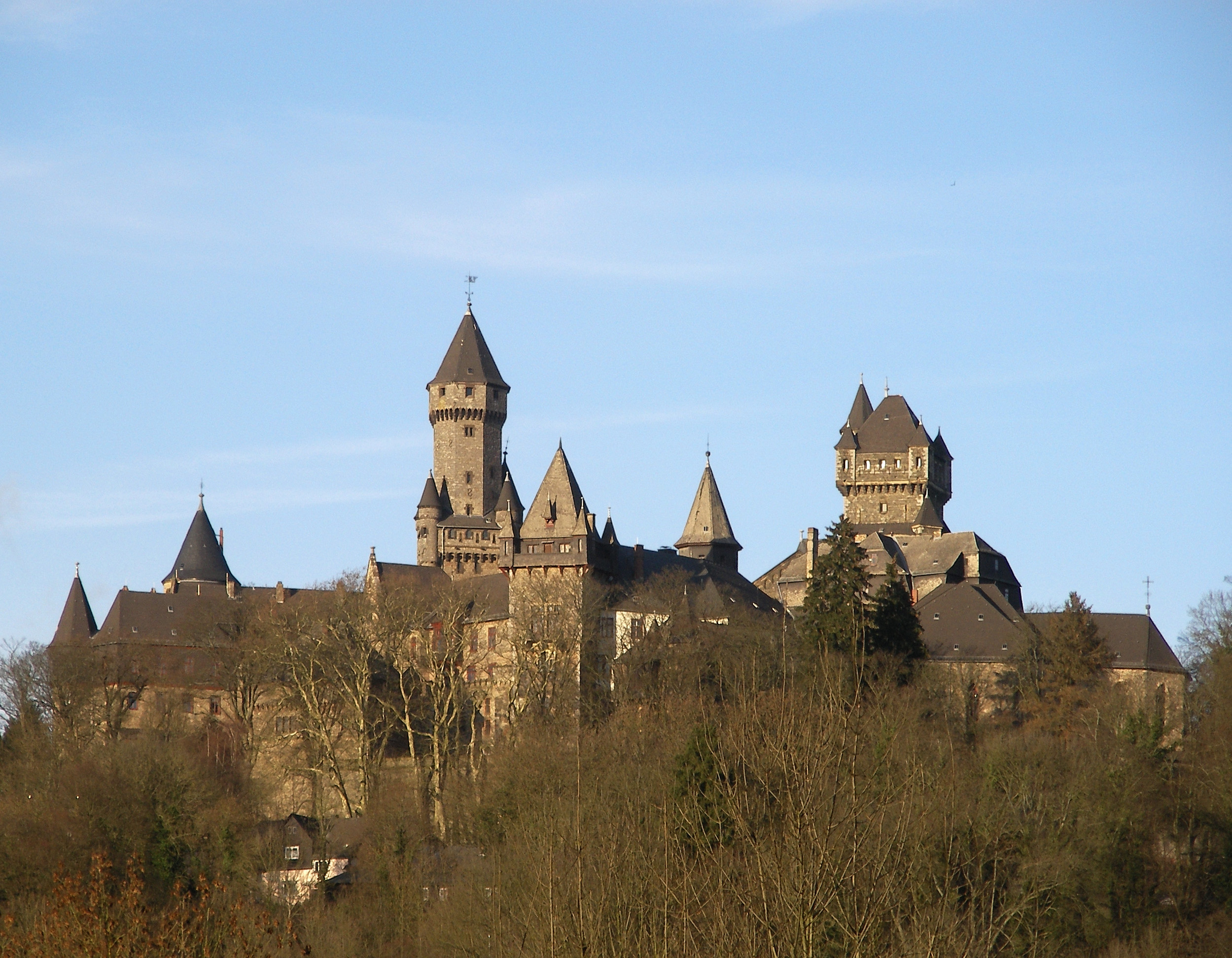 Schloss Braunfels (Castle Braunfels), Braunfels, Germany